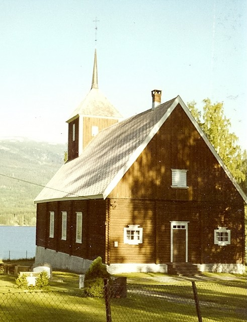 Veikåker kapell